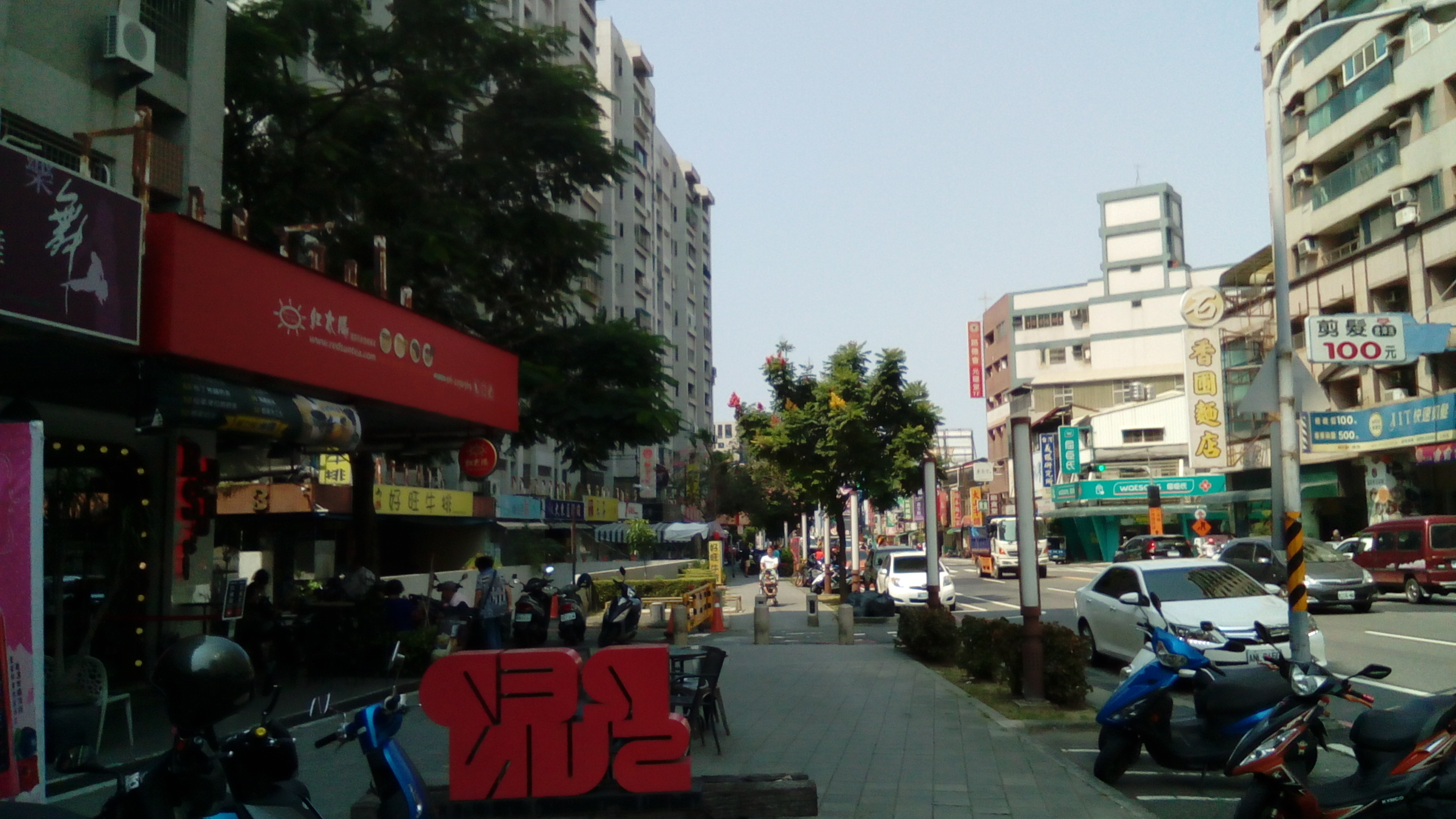 位於大同路旁